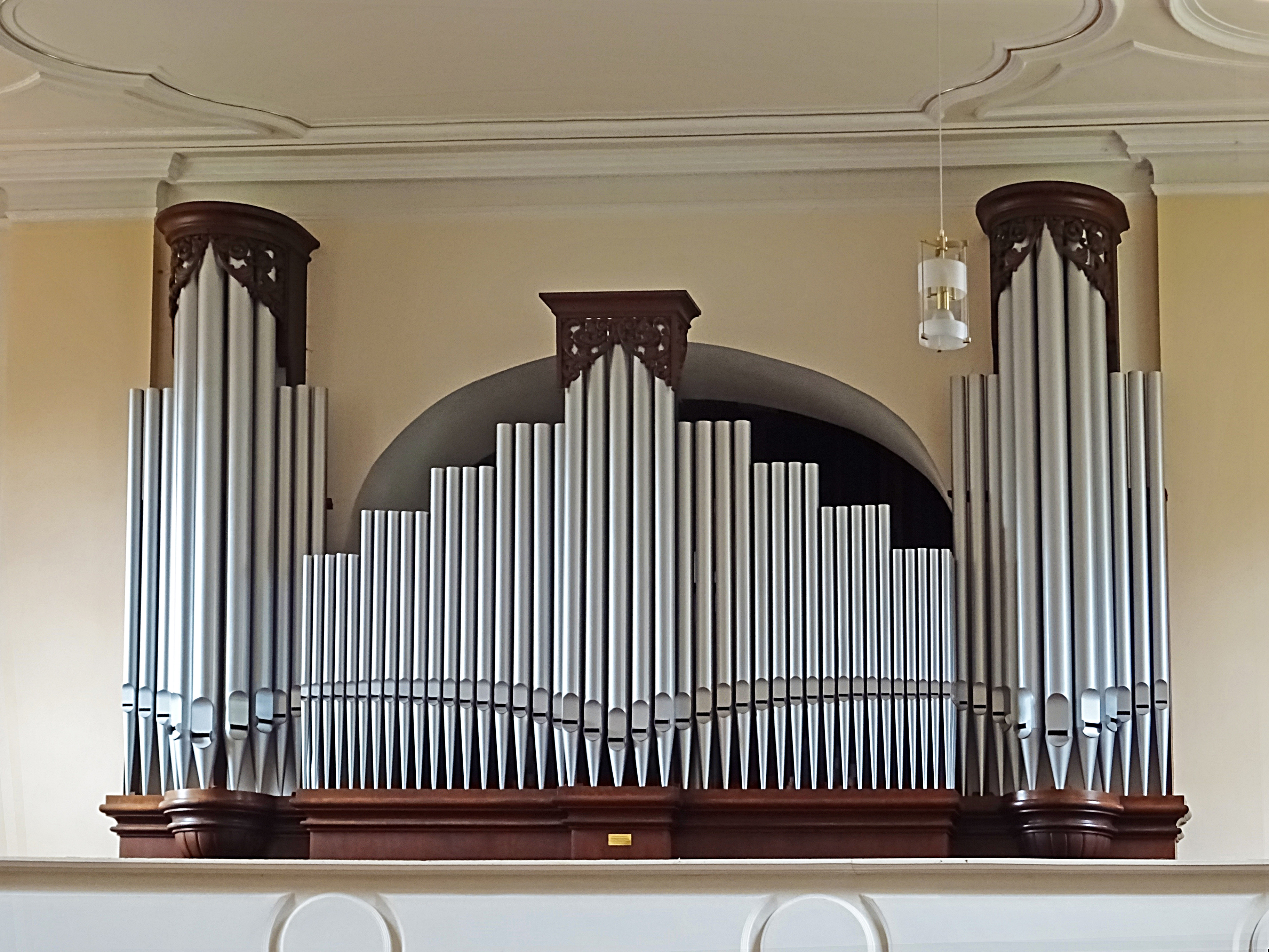 Orgel von Anton Feith jr. (1930 IIP/29) in der Dorfkirche St. Cosmas und Damian in Geisleden[1], generalsaniert von Johannes Motz Orgelbau[2]